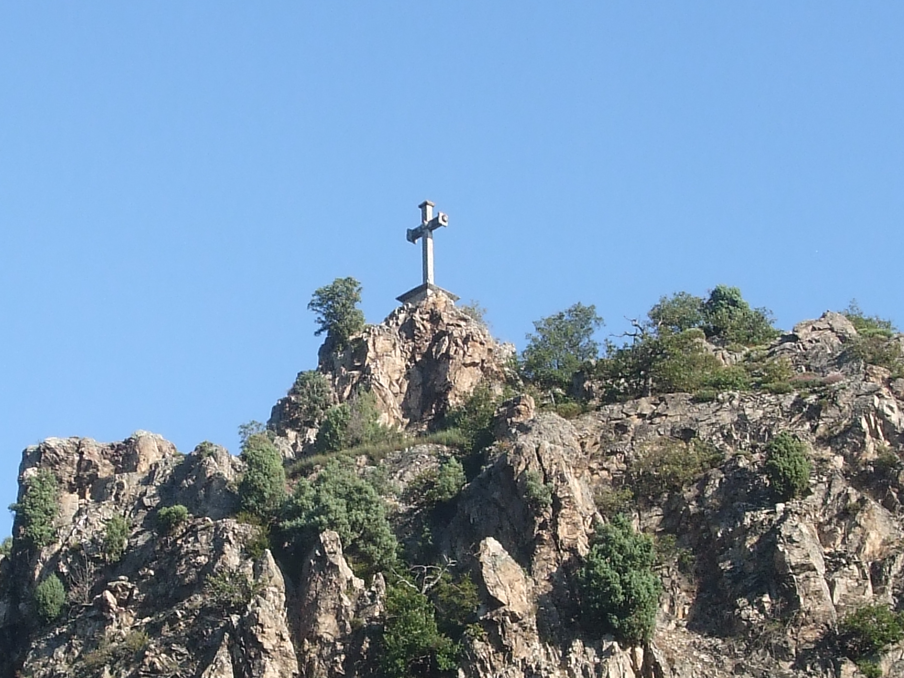 entre Sarras et Ardoix